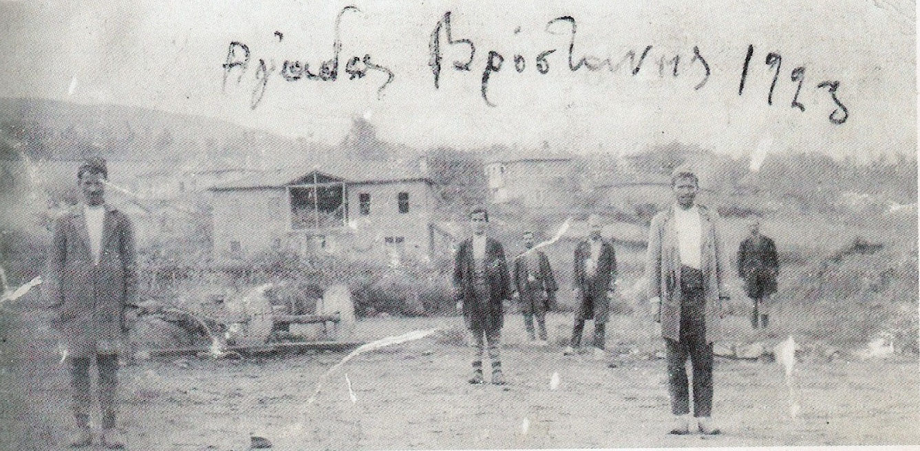 Валахади във Врощани.